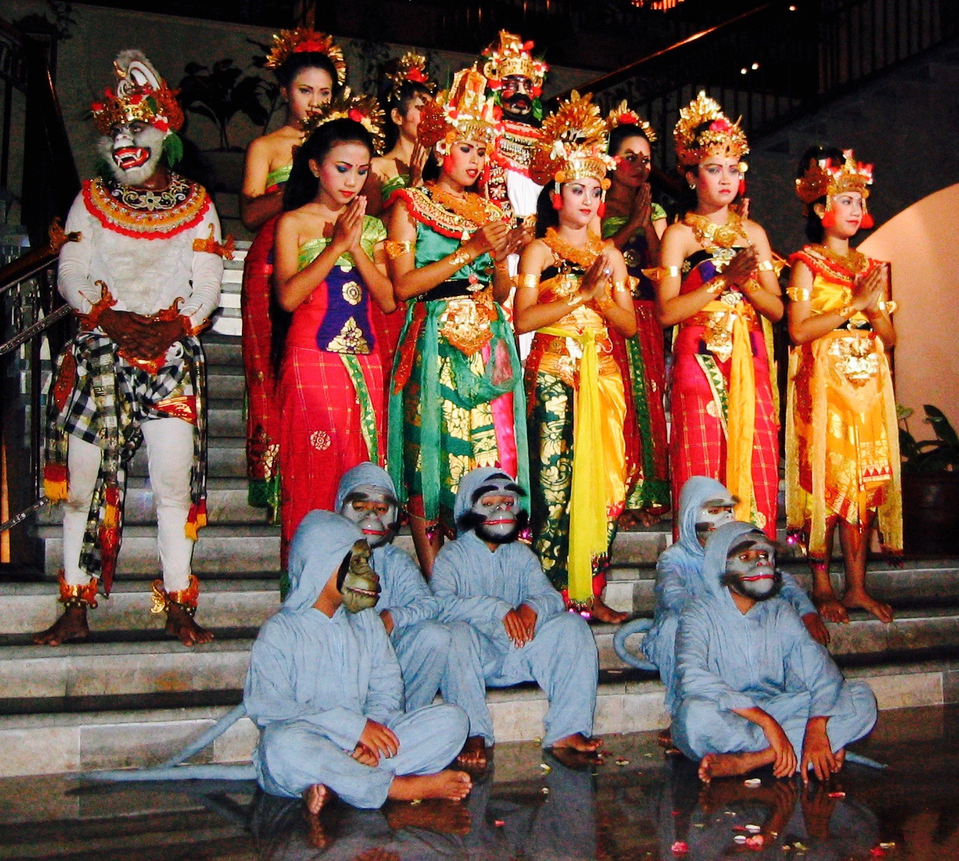 Bali Rama Ravana Hanuman Ramayana